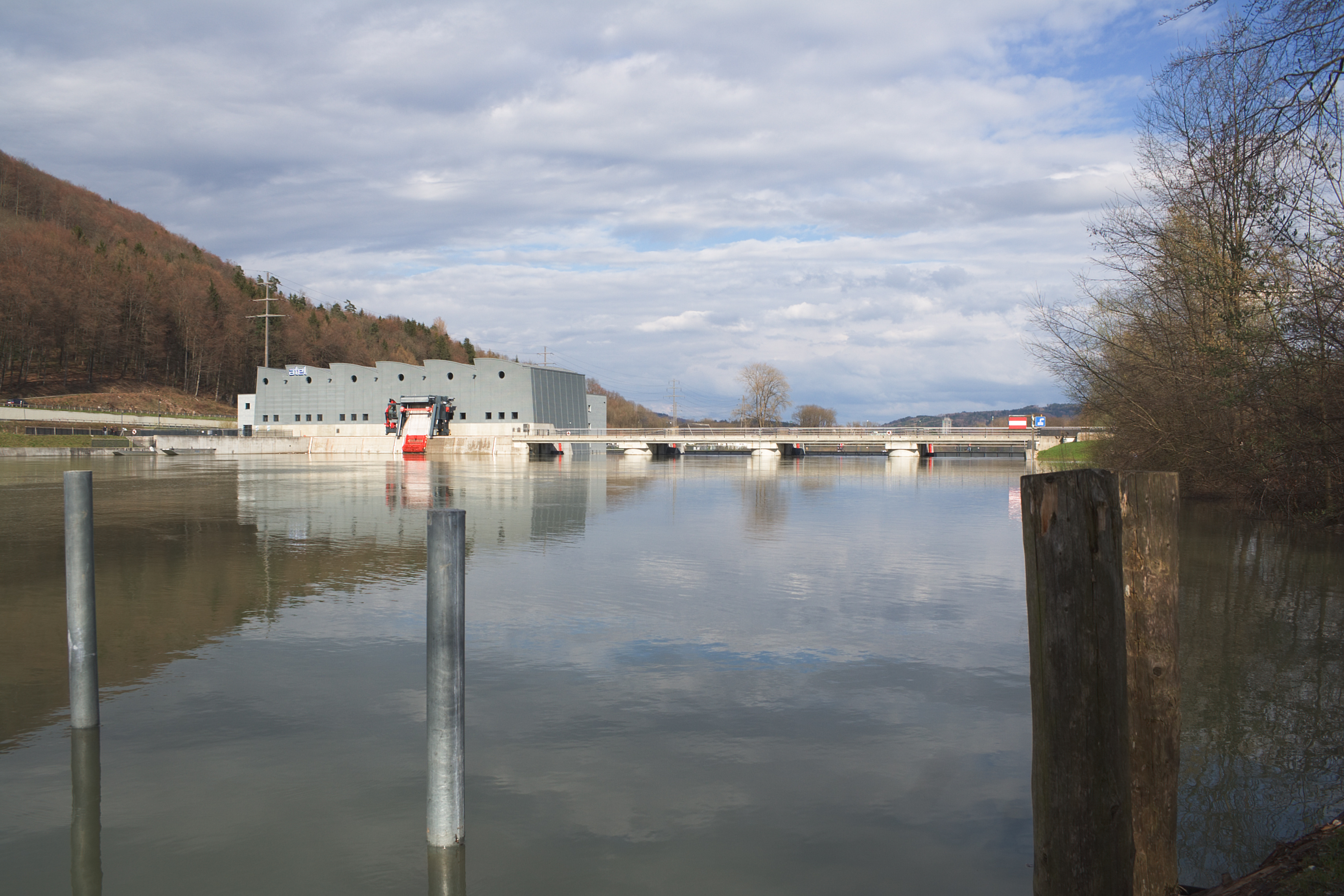 Flusskraftwerk Ruppoldingen bei Rothrist, Schweiz